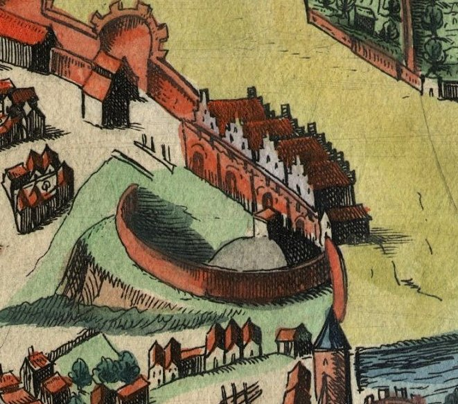 Royal Castle im Poznań, part of Image:Poznan Braun Hohenberg.jpg